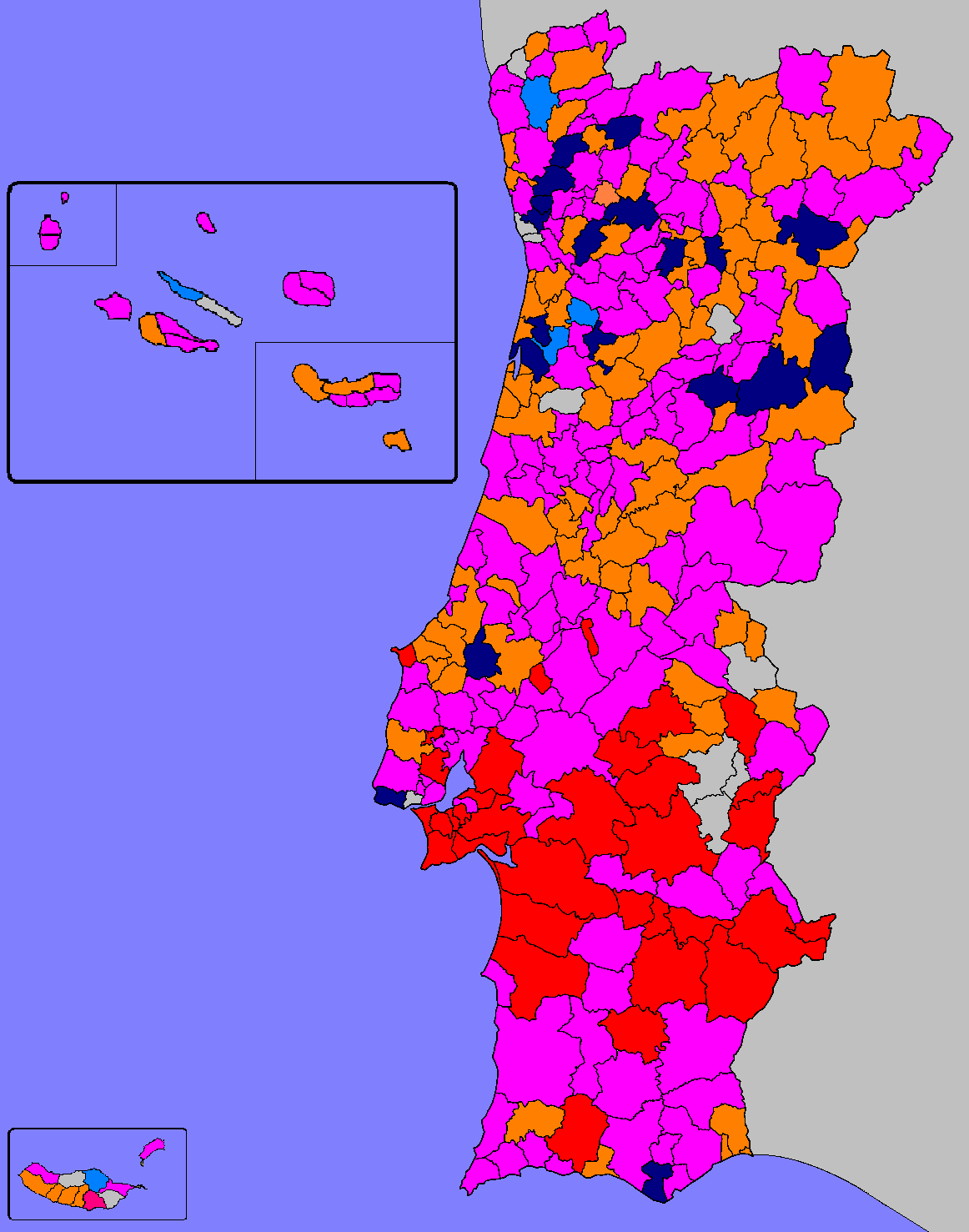 Mapa ilustrativo do partido líder por Concelho